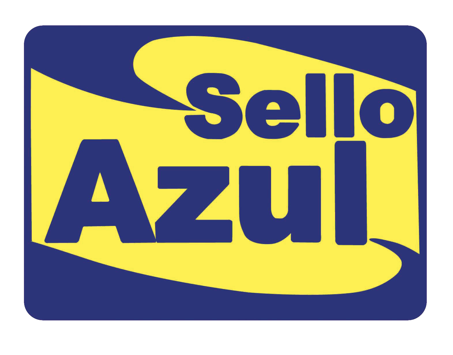 Logo de Sello Azul Sello Azul